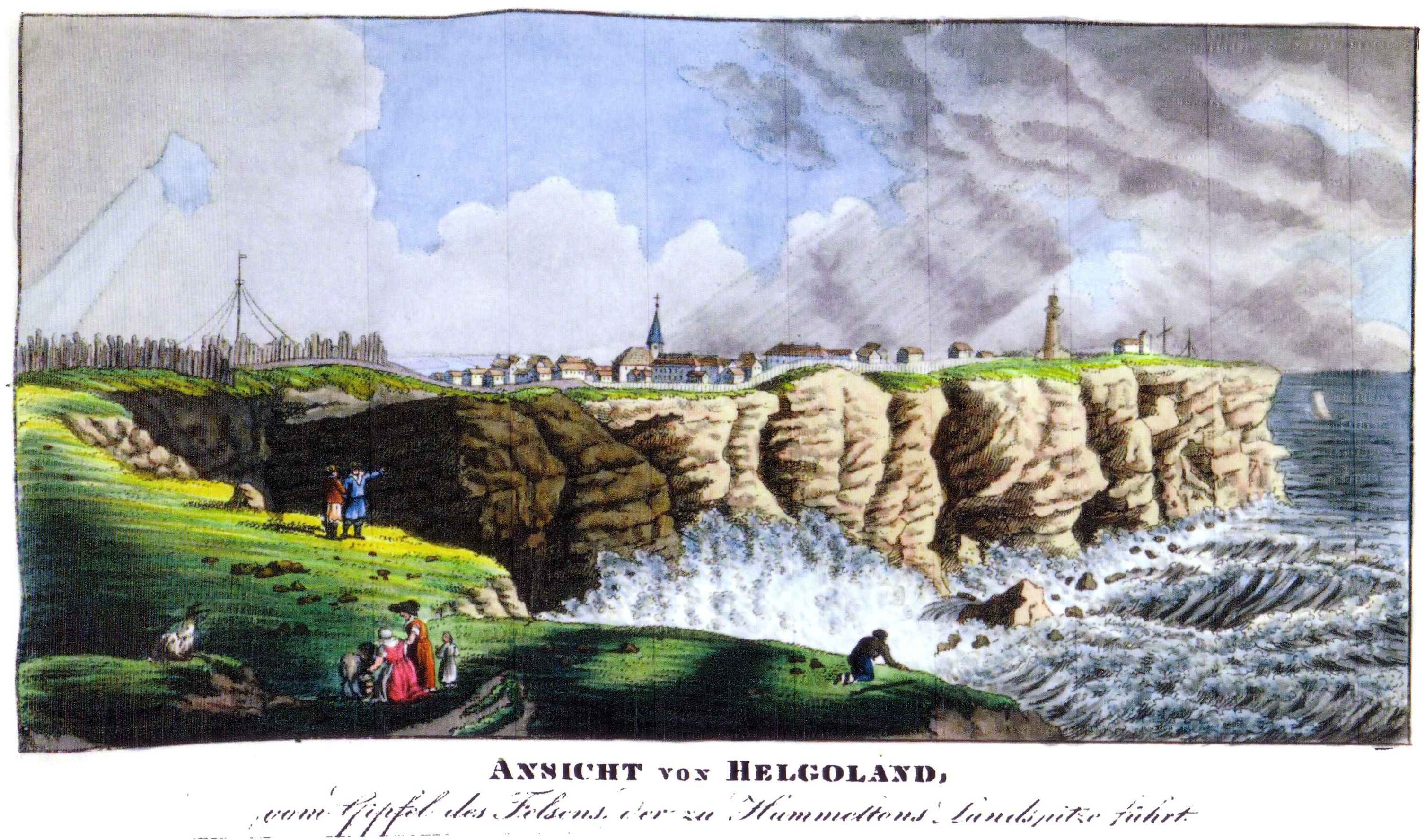 Kupferstich von 1826: Blick vom Gipfel des Felsen, der zur Hamilton' s Landspitze (Point)führt